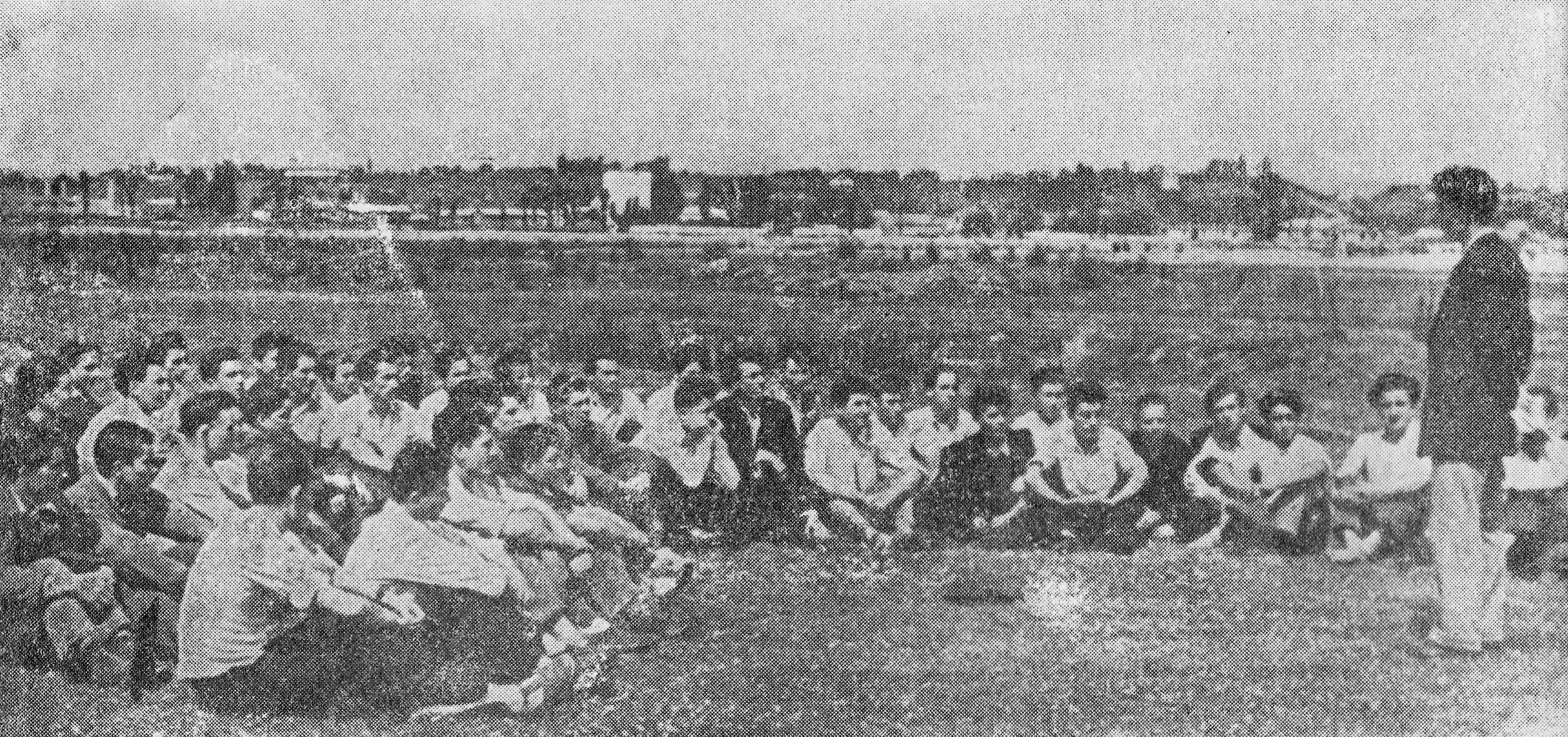 Srpski (latinica): Vreme predavanja. Izgradnja Novog Beograda (1948-1950)